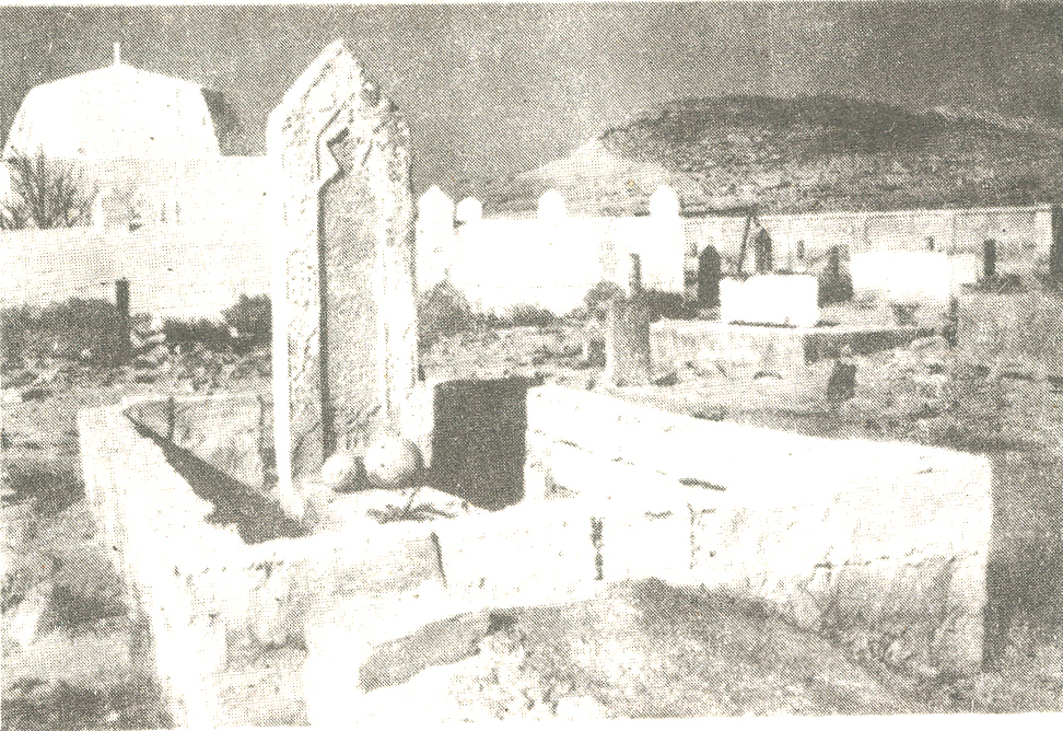 Sofi Həmid piri kompleksi. Şirvan